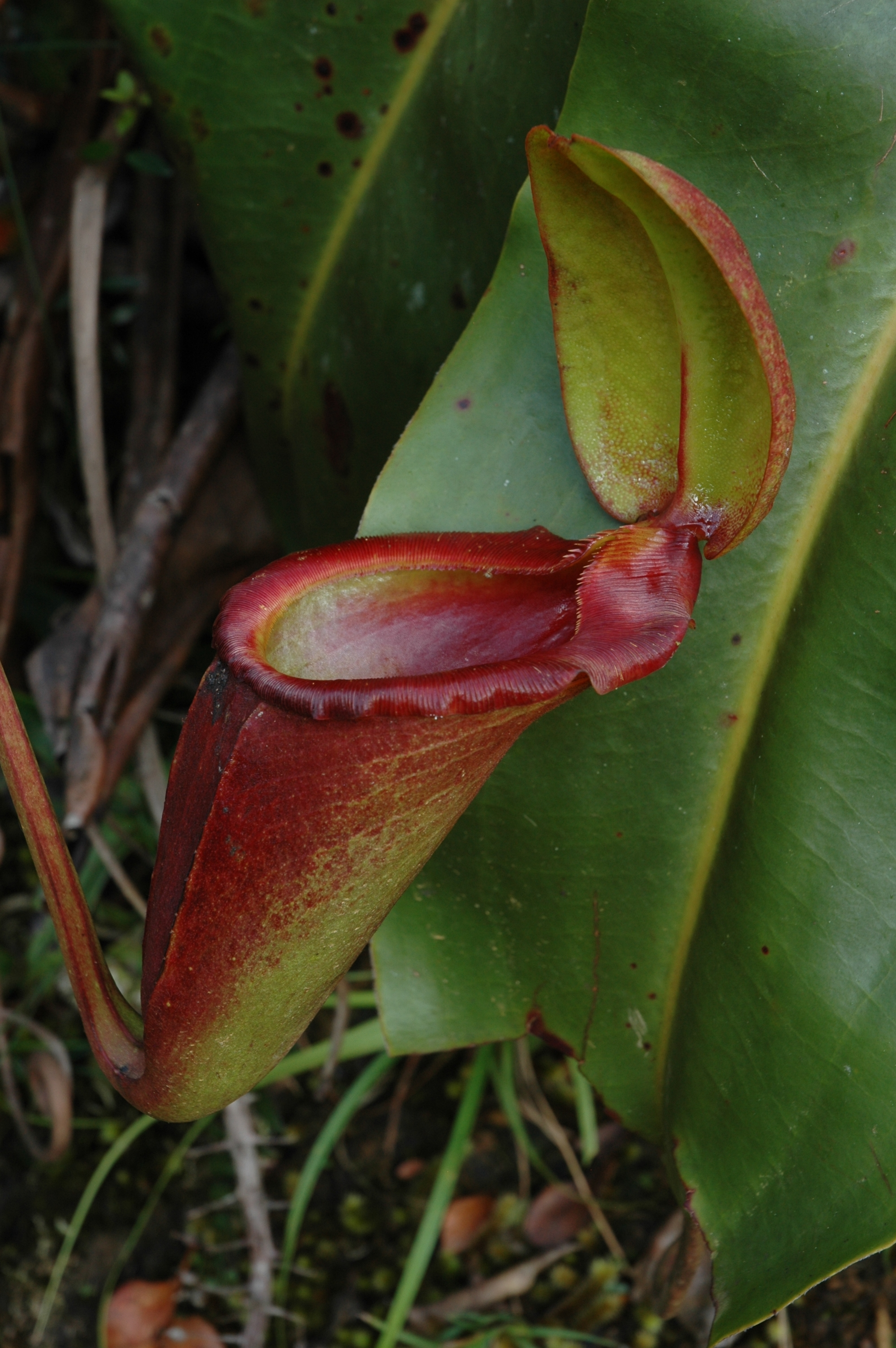 Nepenthes rajah upper pitcher Kinabalu Mesilau by Jeremiah Harris